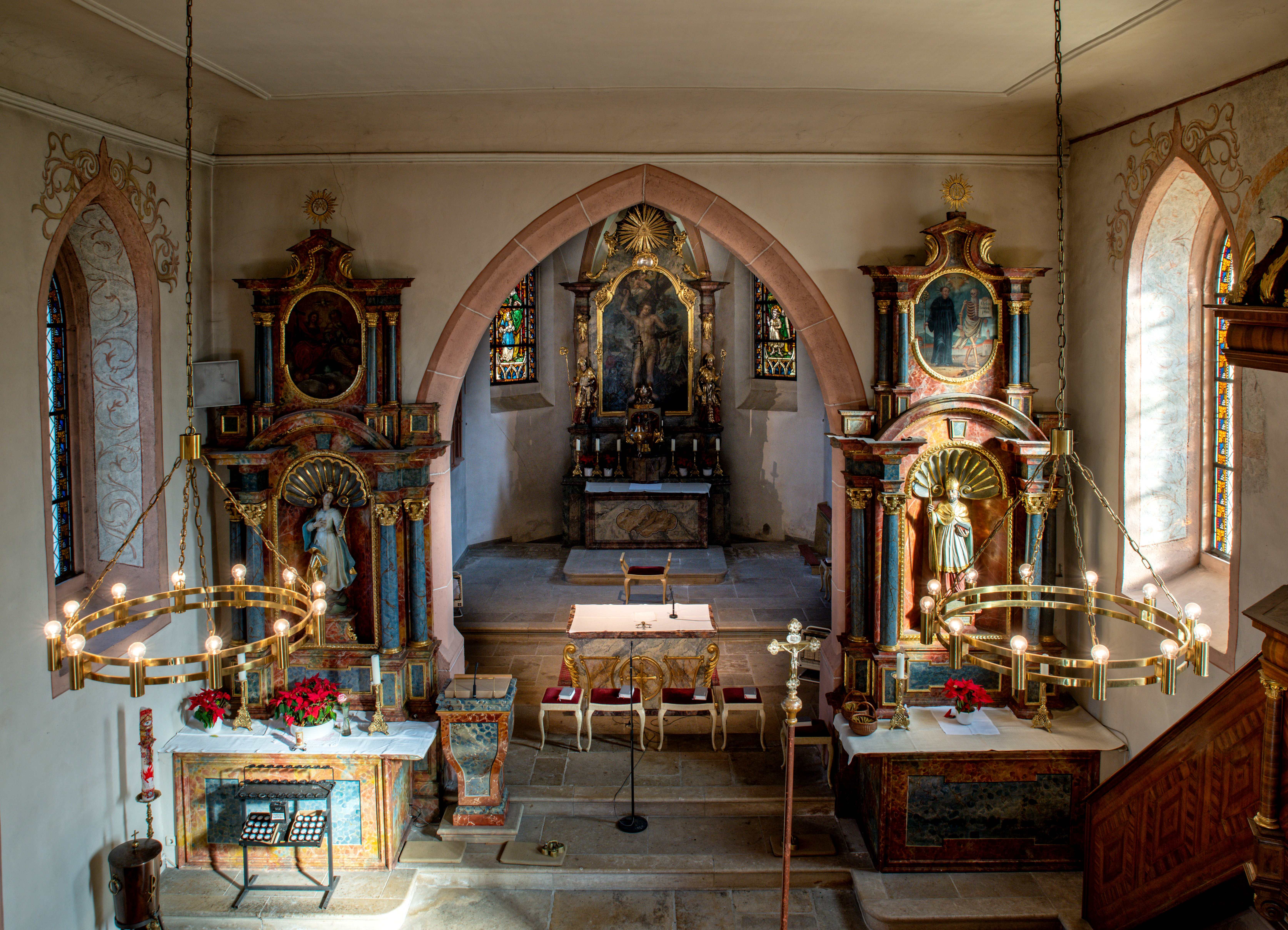 Innenaufnahmen der Kirche